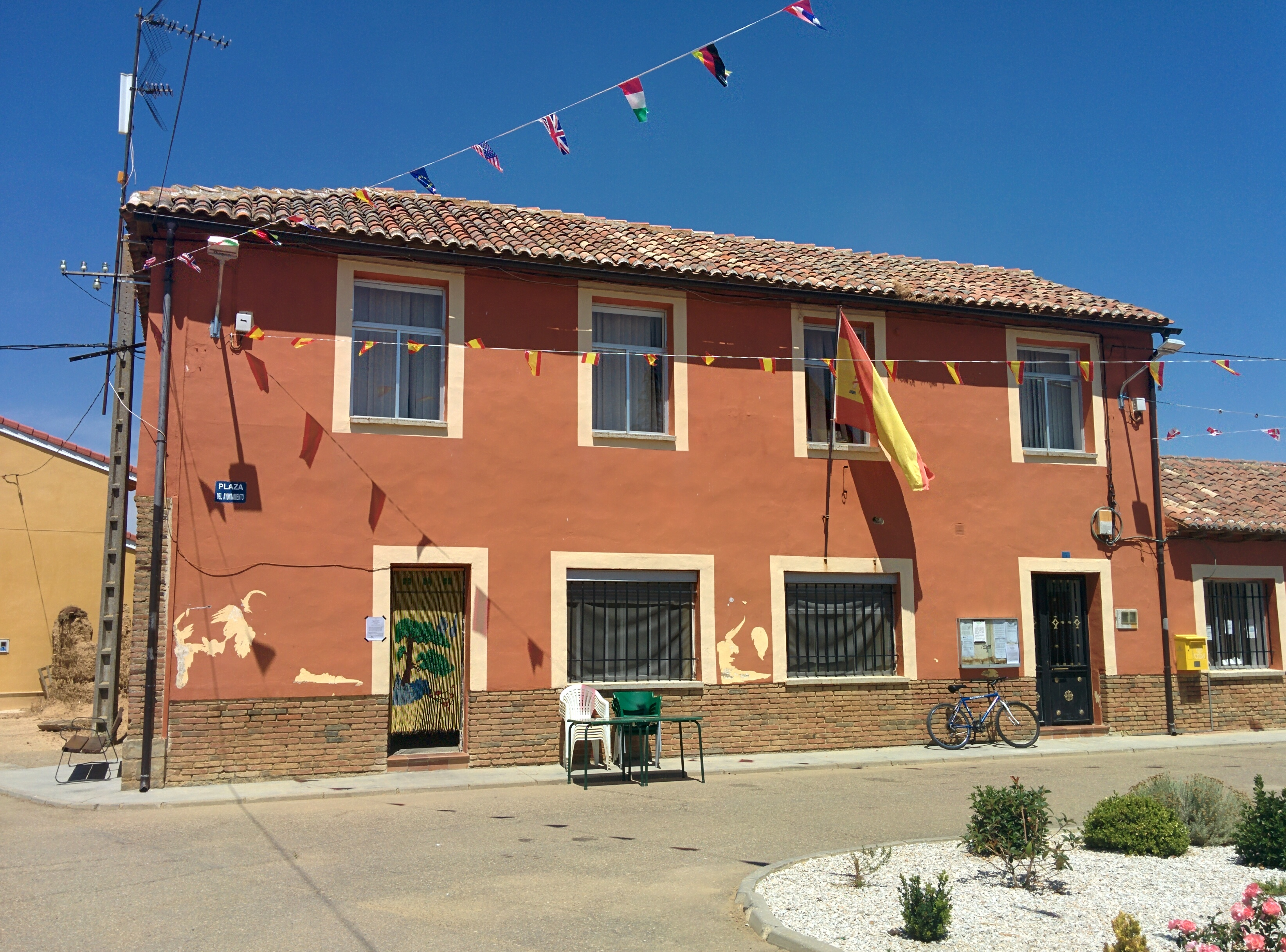 Casa consistorial de Villamuera de la Cueza (Palencia, España).